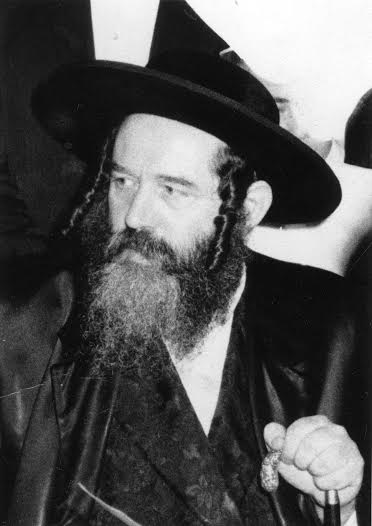 האדמו"ר רבי דוד משה מקרעטשניף